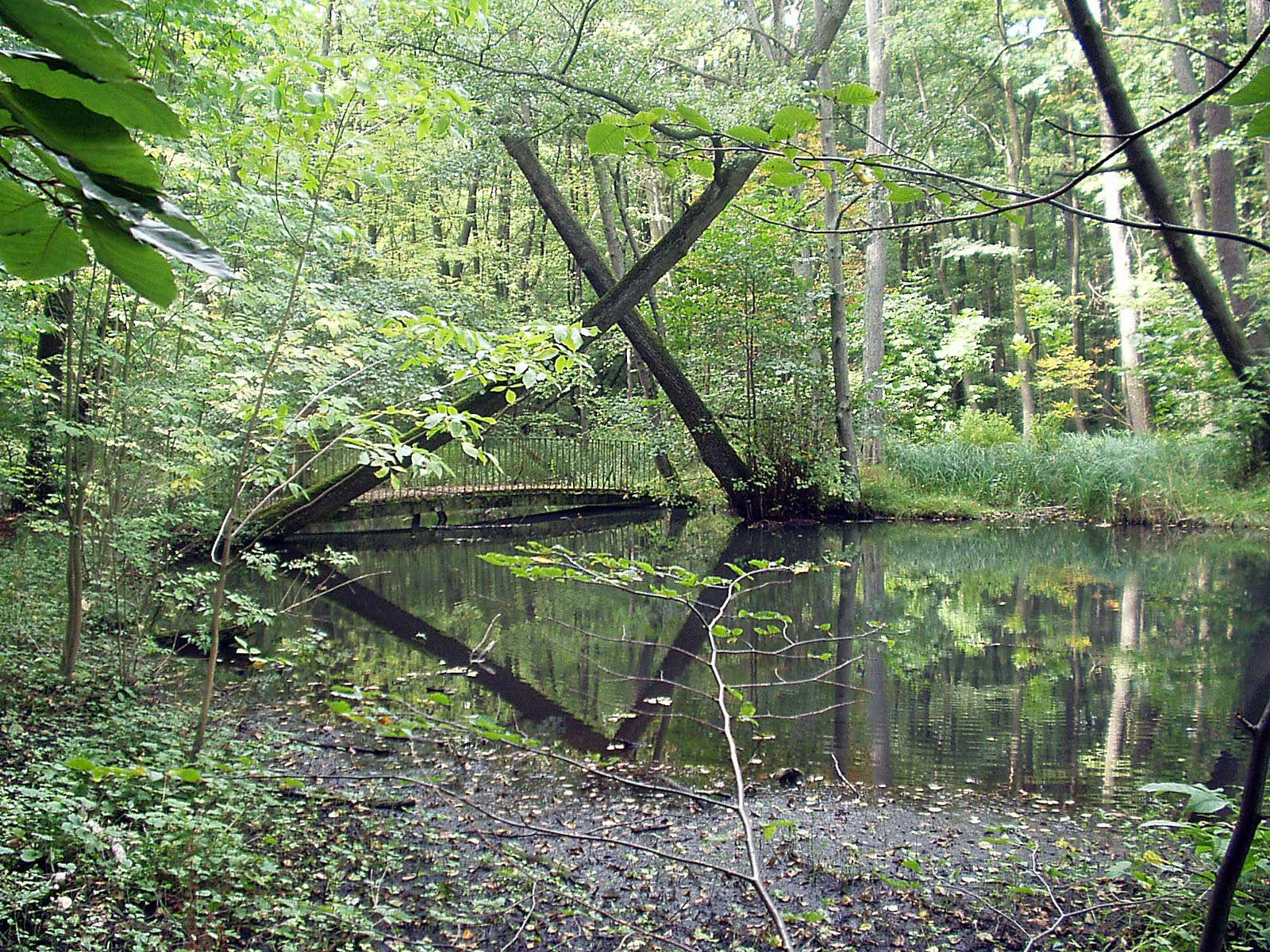 Das Flüßchen Schwärze südlich von Eberswalde; Wünschelbrücke in der Nähe der Zainhammer Mühle